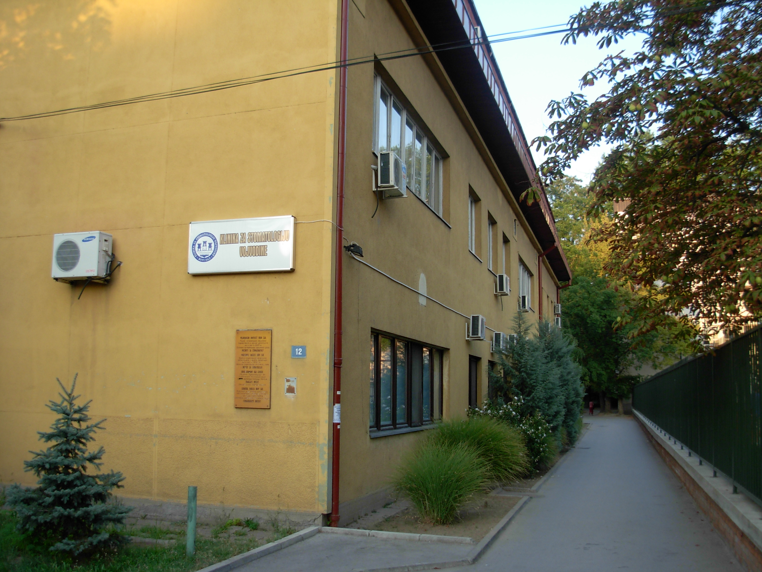 Klinika za stomatologiju Vojvodine. Medicinski fakultet Univerziteta u Novom Sadu.